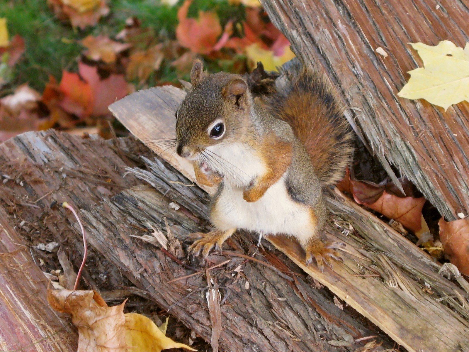 Tamiasciurus hudsonicus Écureuil roux nord-américain -- North American red squirrel